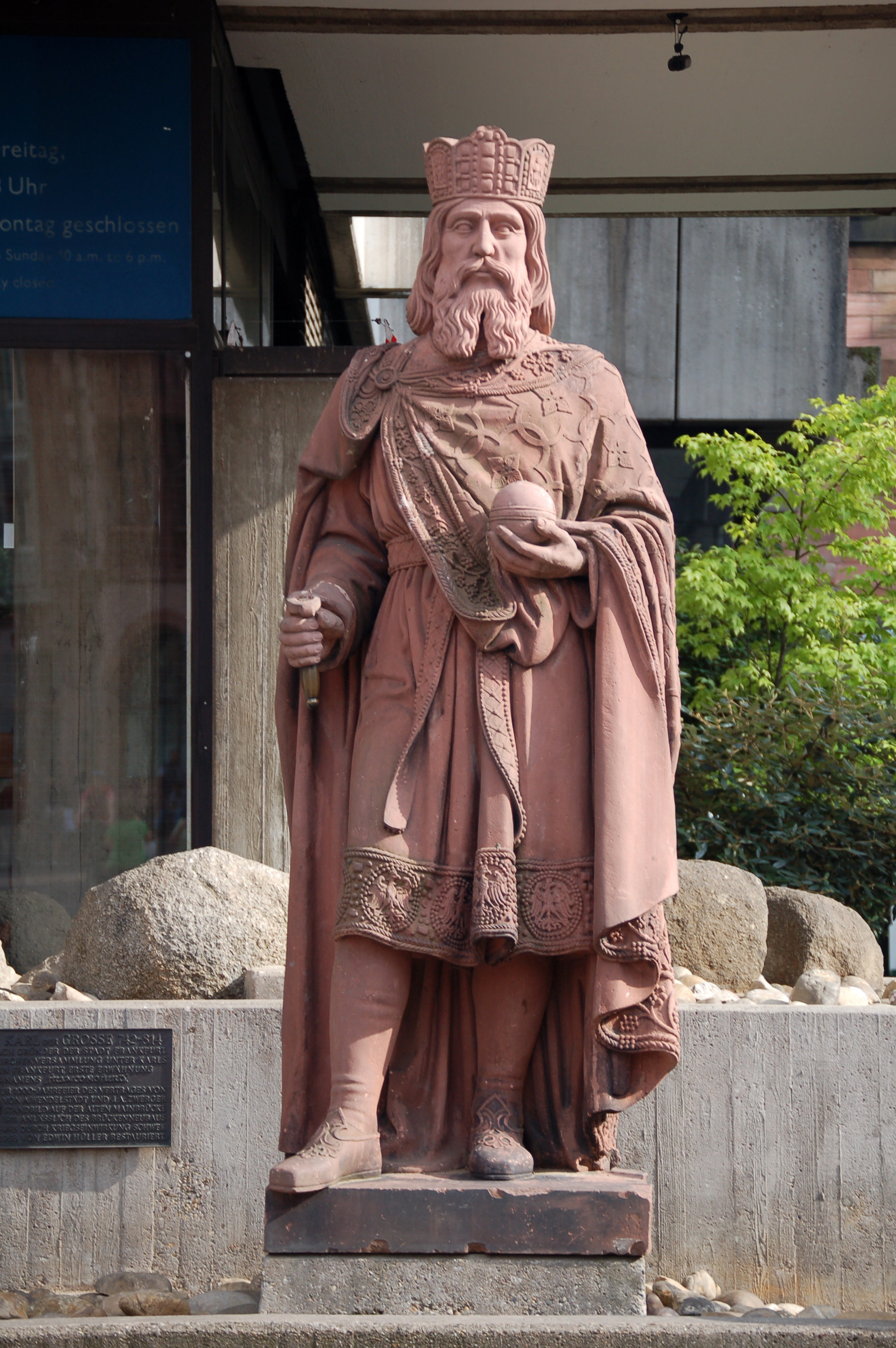 Statue Karls des Großen vor dem Eingang des Historischen Museums Frankfurt am Main, von Johann Nepomuk Zwerger Die Statue wurde durch Vandalismus während der Fußball-WM 2006 beschädigt, es fehlen das Schwert, das Kreuz auf der Krone und das Kreuz auf dem Reichsapfel.